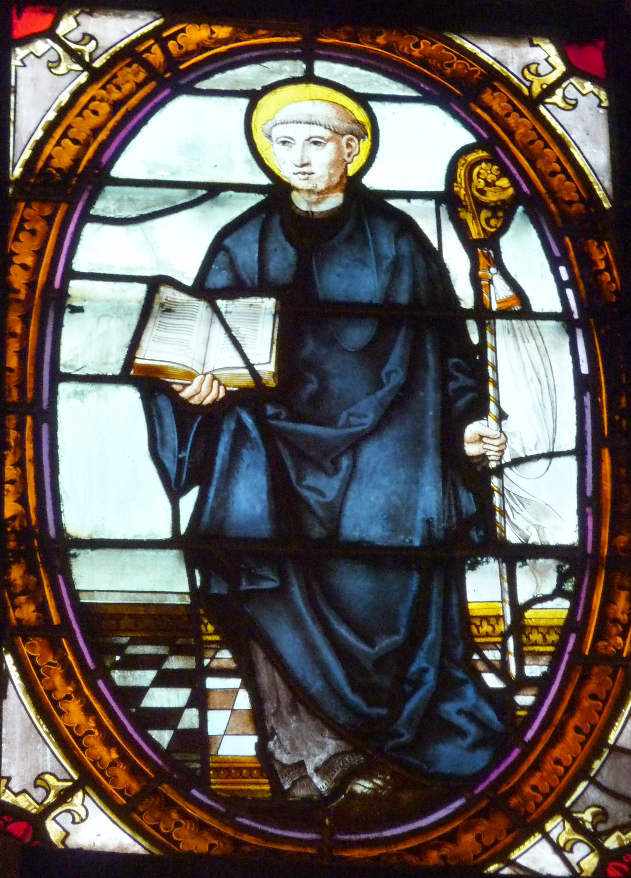 Ausschnitt (Fenster in der "Chapelle de la Vierge", Nr. 1) eines Bleiglasfensters in der katholischen Kirche Saint-Merry in Paris, Darstellung: hl. Medericus (vgl. Élisabeth Pillet: Le vitrail à Paris au XIXe siècle. Entretenir, conserver, restaurer. (Corpus Vitrearum France - Études IX) Presses Universitaires de Rennes, Rennes 2010, S. 281/282, ISBN 978-2-7535-0945-0)